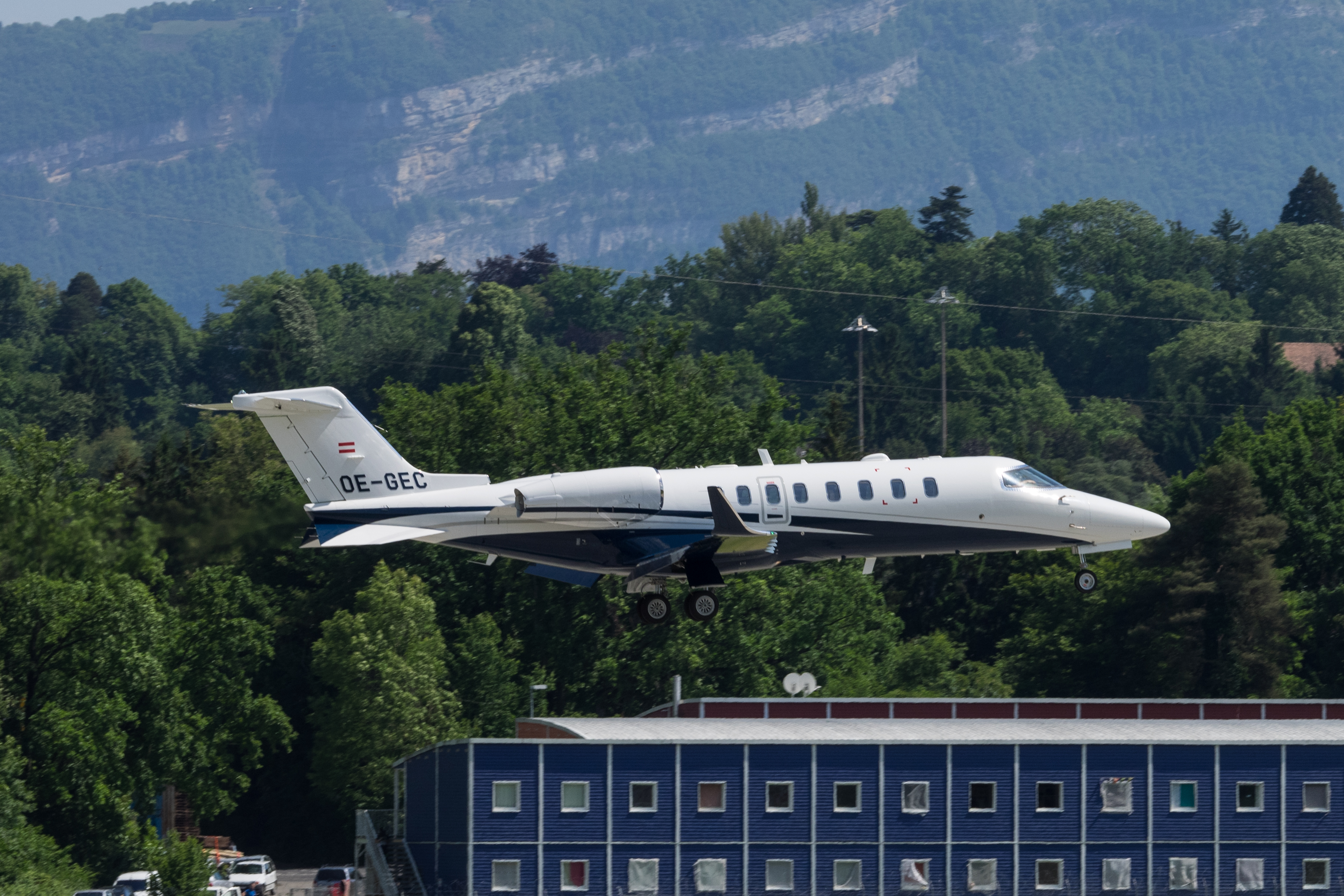 GVA 29.05.2015